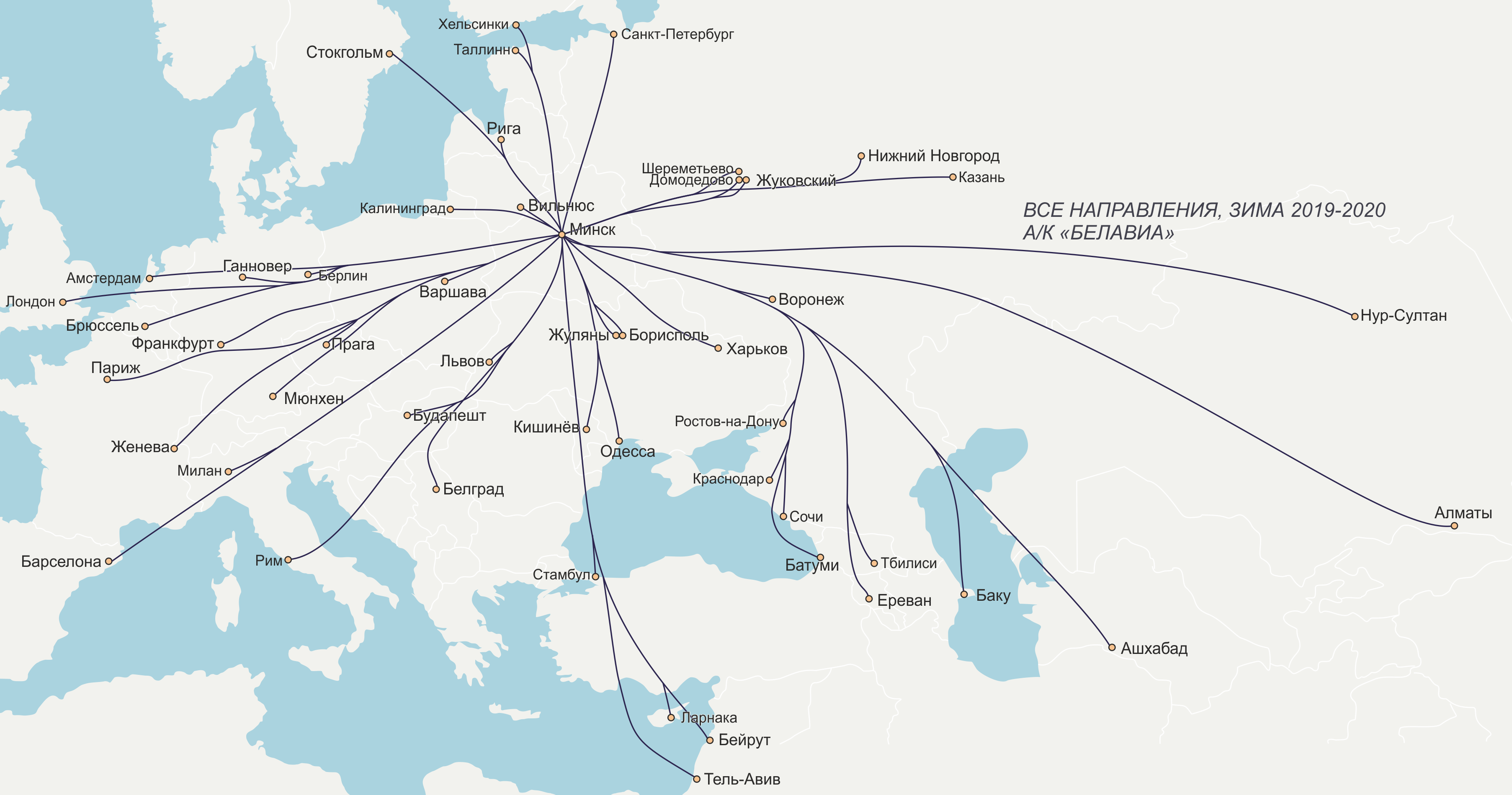 из расписания зима 2019-2020